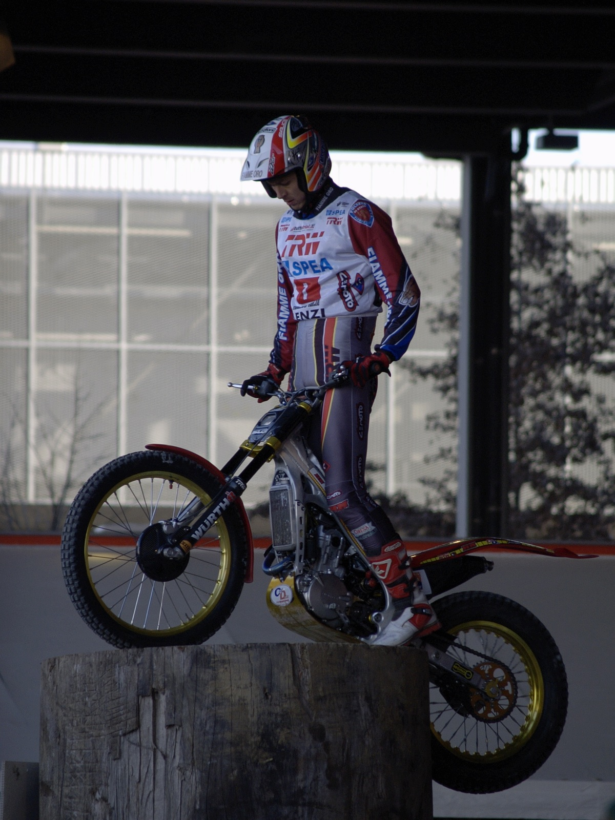 Fabio Lenzi @ EICMA 2007